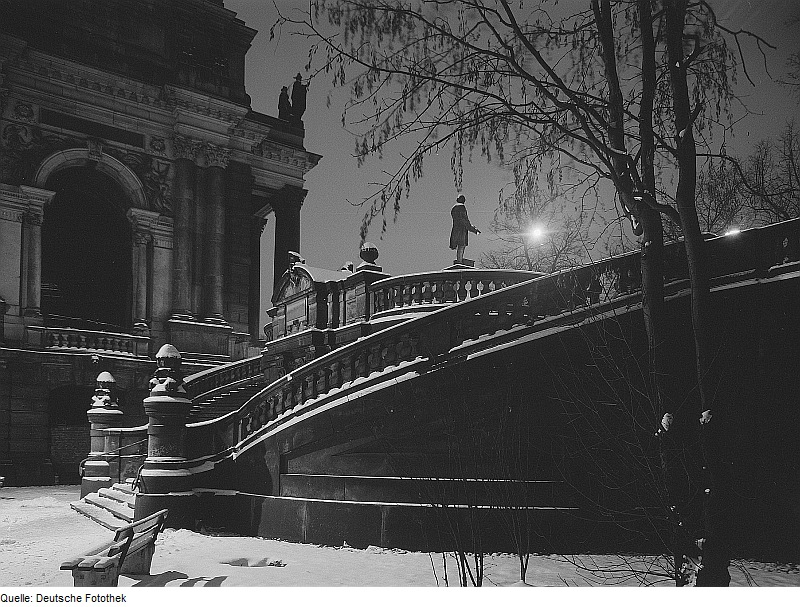 Original image description from the Deutsche FotothekDresden. Aufgang zur Brühlschen Terrasse von Süden am Georg-Treu-Platz